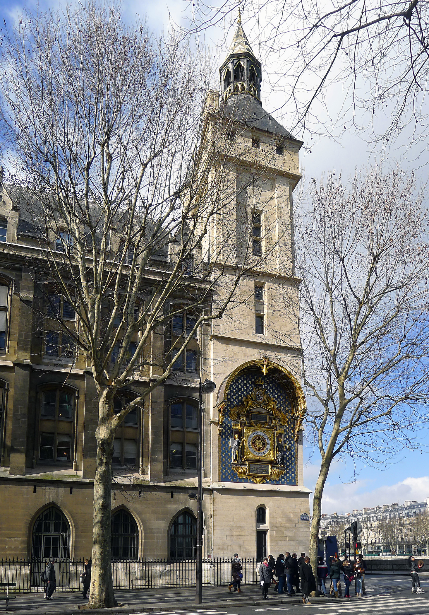 Boulevard du Palais (Conciergerie, horloge Charles V) - Paris Ier .